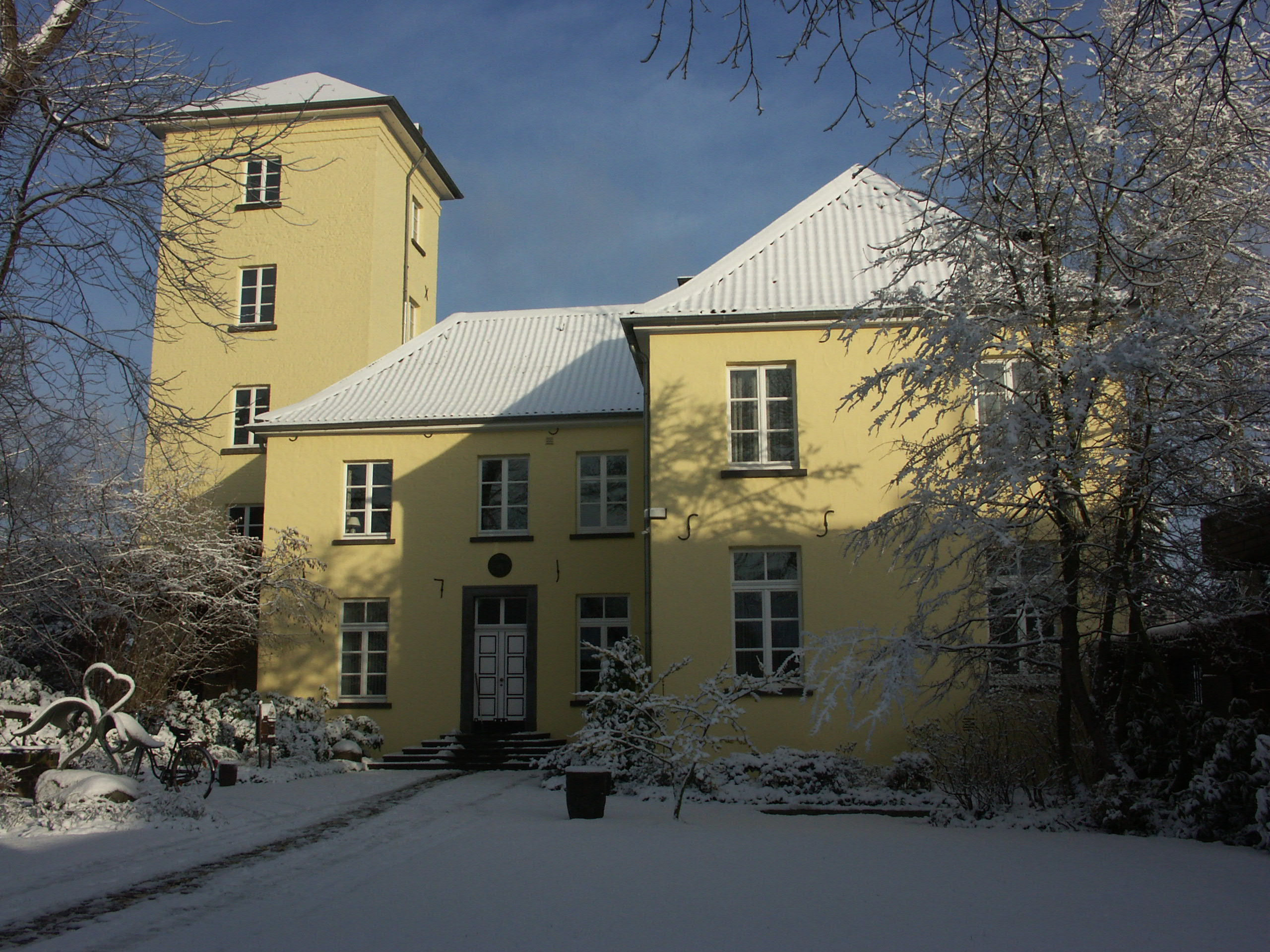 Bakenhof Krefeld Linn